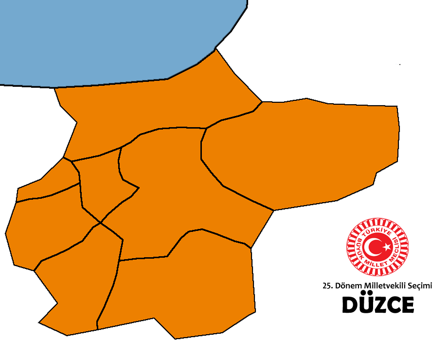 2015 genel seçim sonuçları